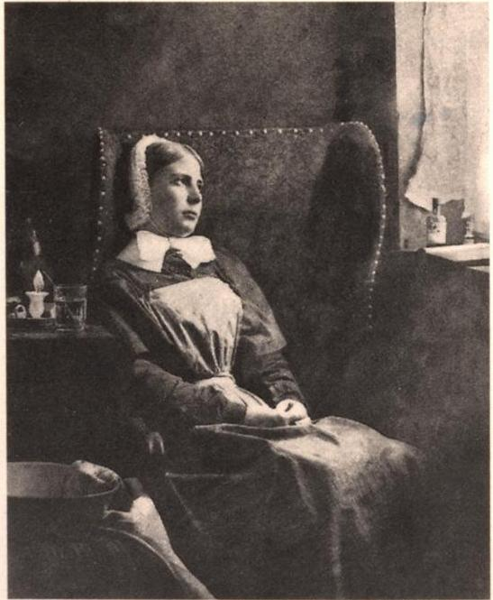 Max Allihn, Frau im Sessel. Barmherzigkeit (1902). Heliogravure, Die Kunst in der Photographie, 1902, AB 1988.H556